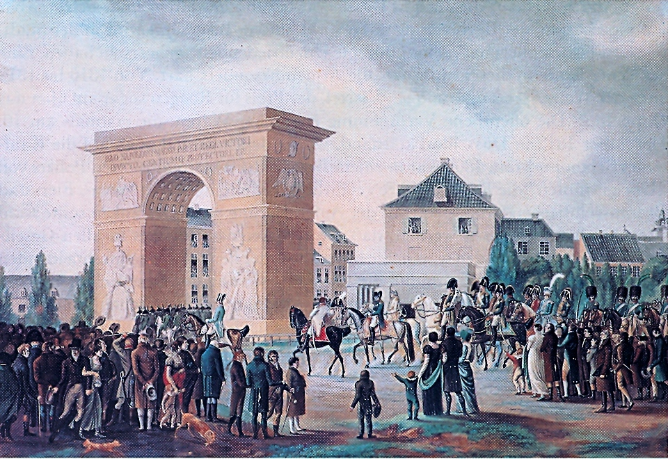 Einzug Napoleons in Düsseldorf im November 1811. Blick auf den Triumphbogen in der Elberfelder Straße entworfen von Adolph von Vagedes. Kolorierte Lithographie von Johann Petersen